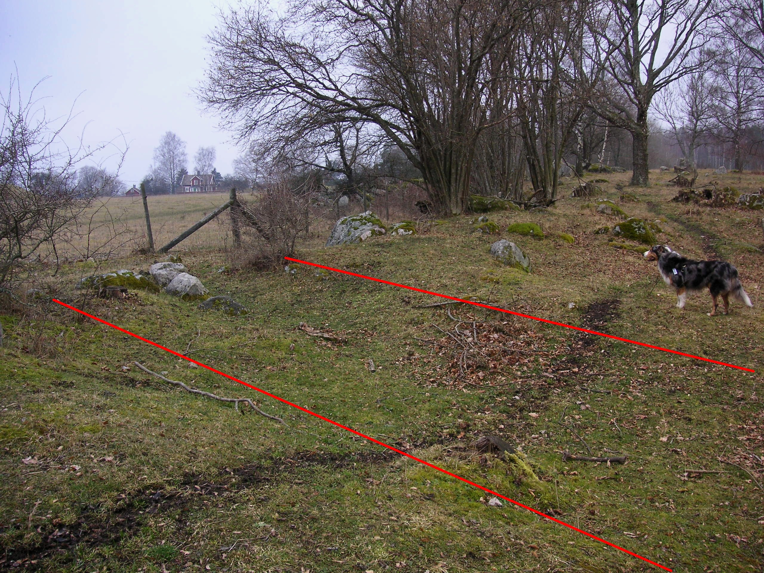 "Naust" (båtränna från vikingatiden) vid Hovgården på Adelsön. En fördjupning mellan de röda linjerna vid den forntida strandkanten.